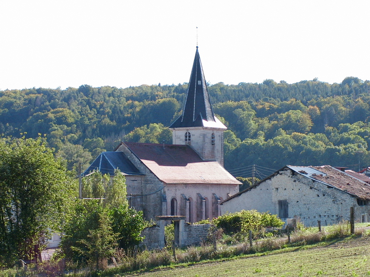 Eglise de Broussey-en-Blois (55) vue depuis la route de Naives-en-Blois sur fond de forêt Photo prise en automne 2005 par F5ZV